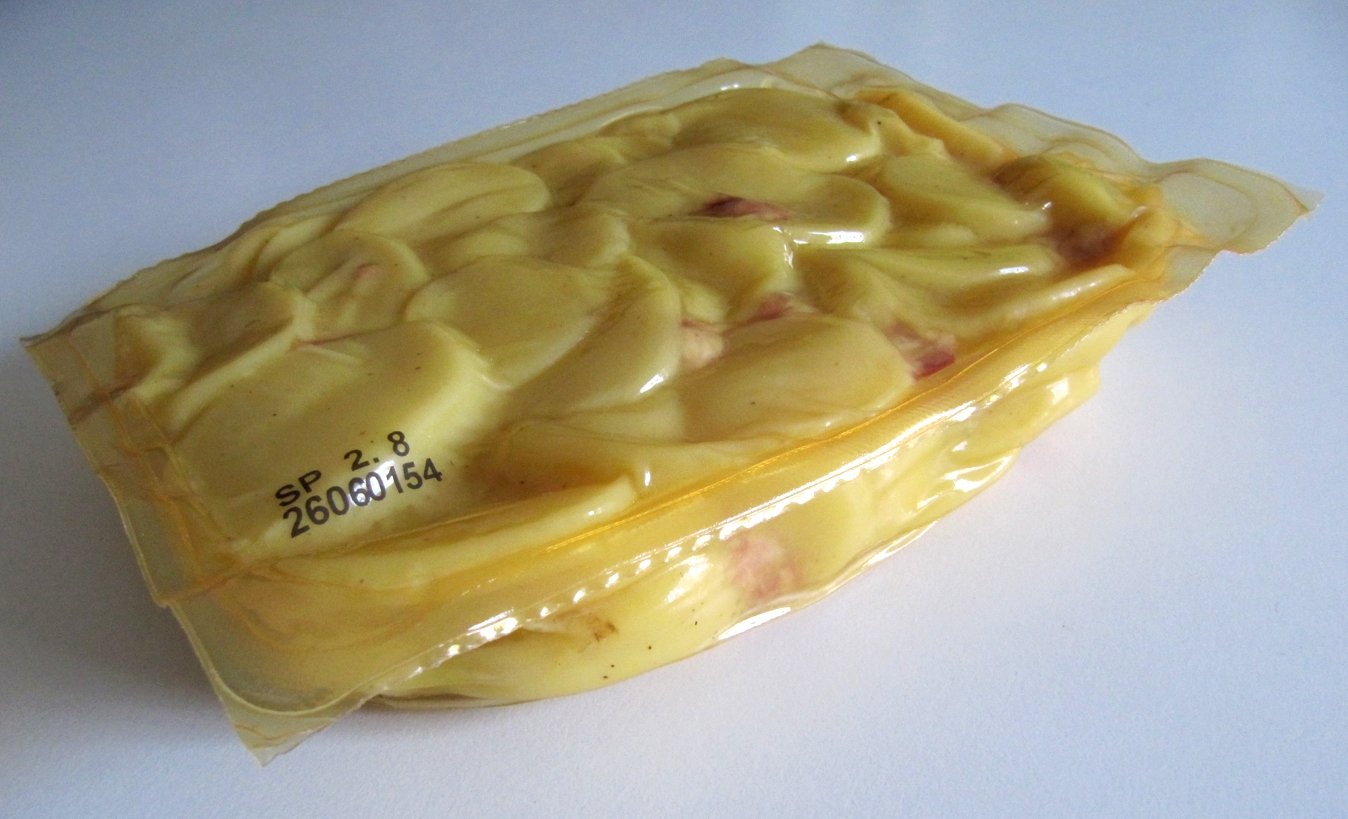 Supermarkt-CF-Bratkartoffeln_1 (Convenience Food)